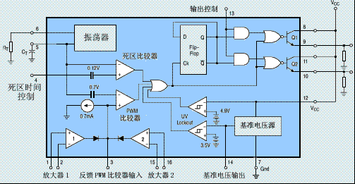 TL494脉宽调制集成芯片的内部功能框图